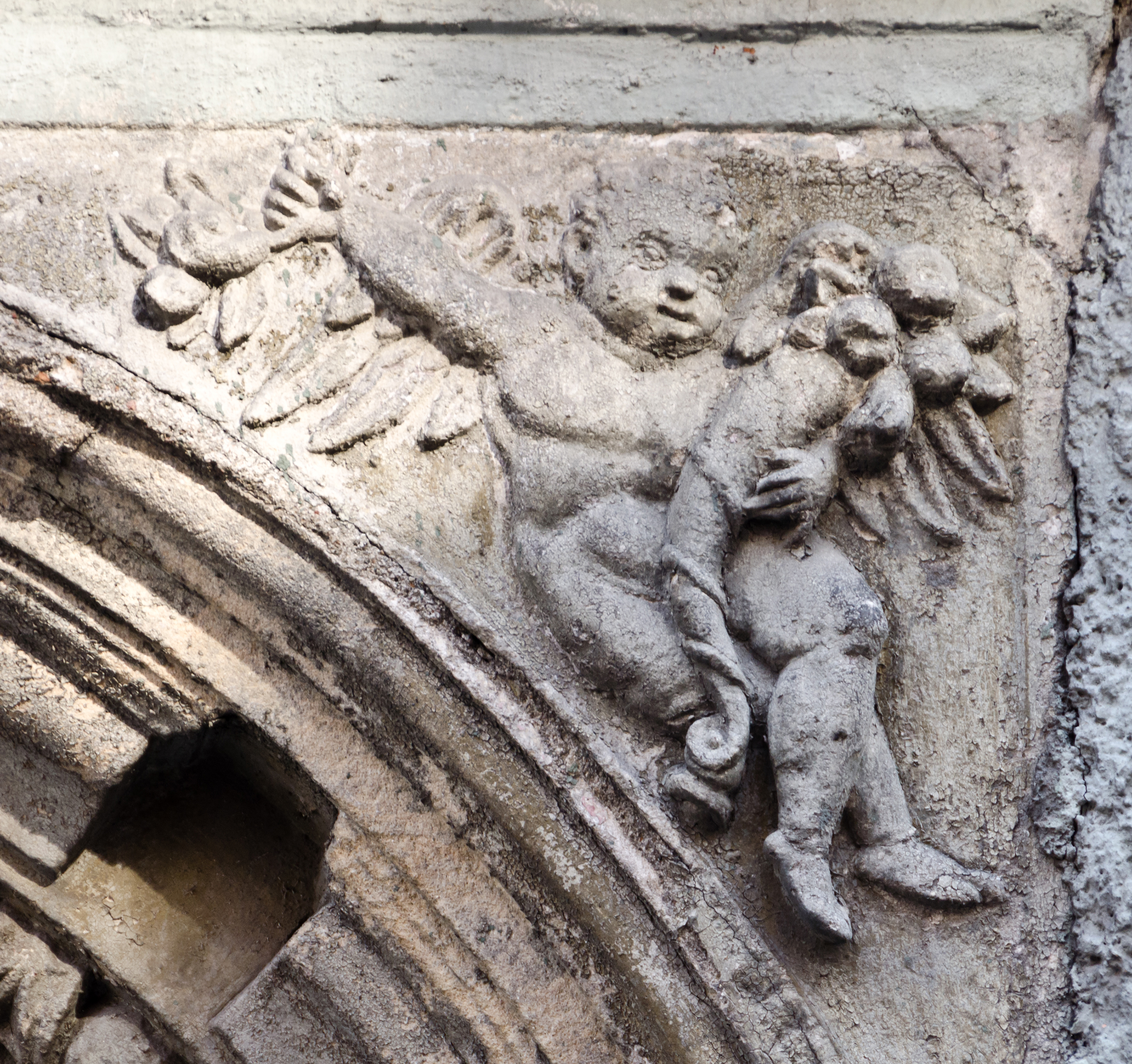 Kłodzko, dom, XV, XIX-XX